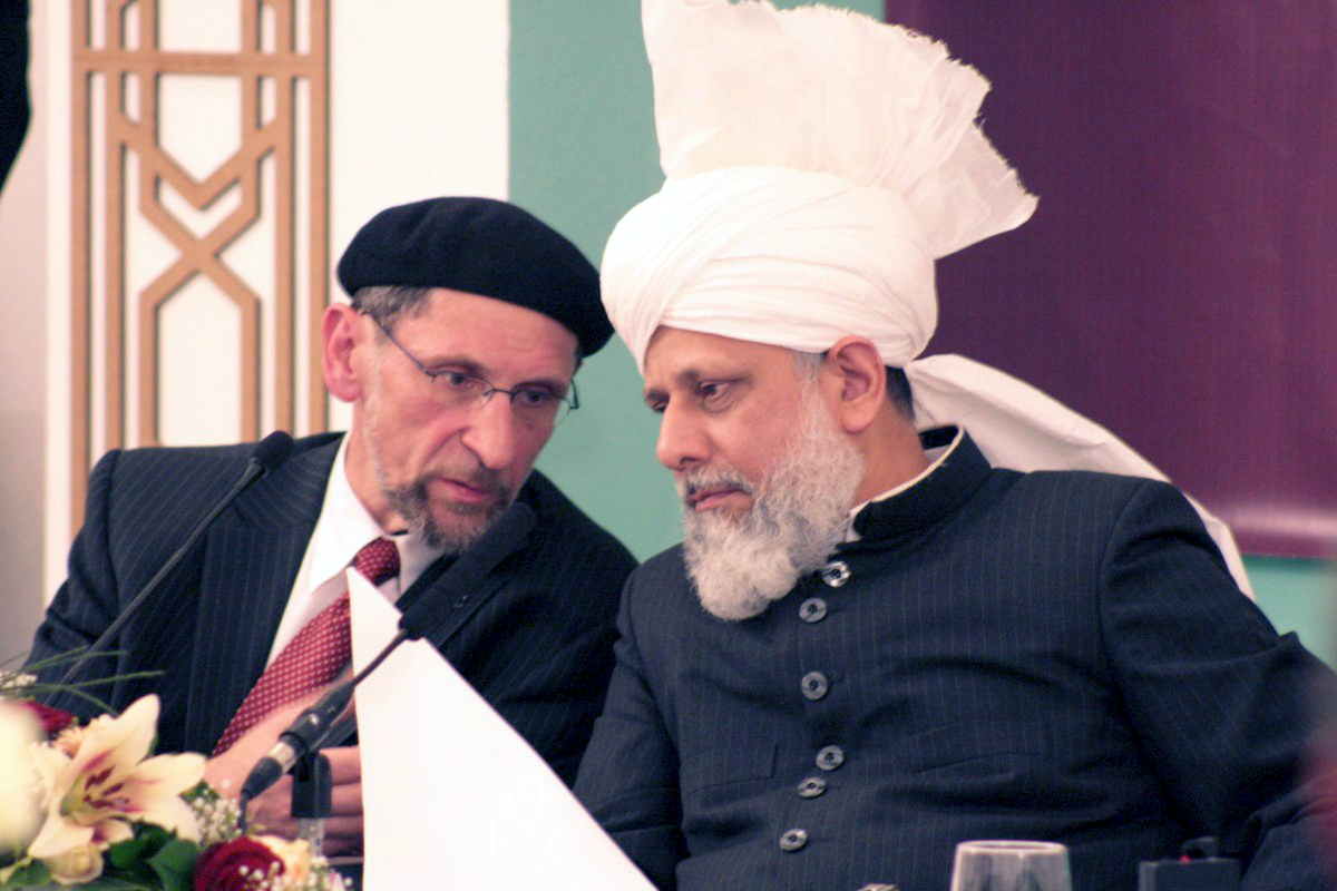 Hadhrat Mirza Masroor Ahmad (atba), Khalifat-ul-Masih V. und Abdullah Wagishauser, Amir Jamaat BRD anlässlich der Eröffnung der Khadija Moschee in Berlin am 16. Oktober 2008.